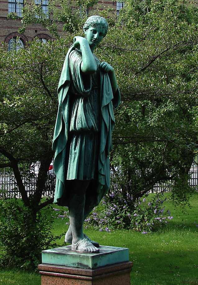 Artemis, afstøbning af romersk kopi efter græsk original fra det 4. århundrede f.Kr., Botanisk Have, København